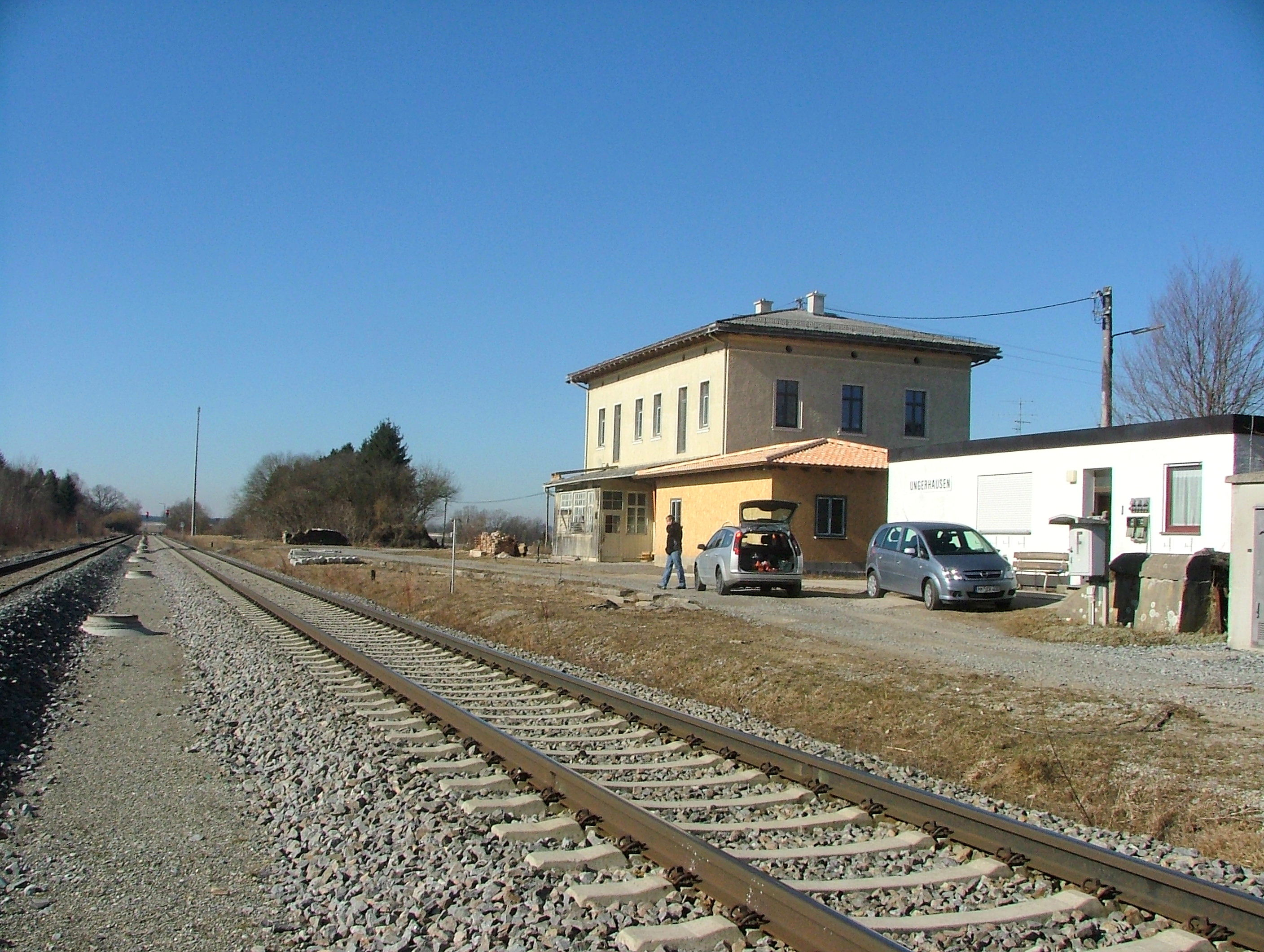 Bahnhof